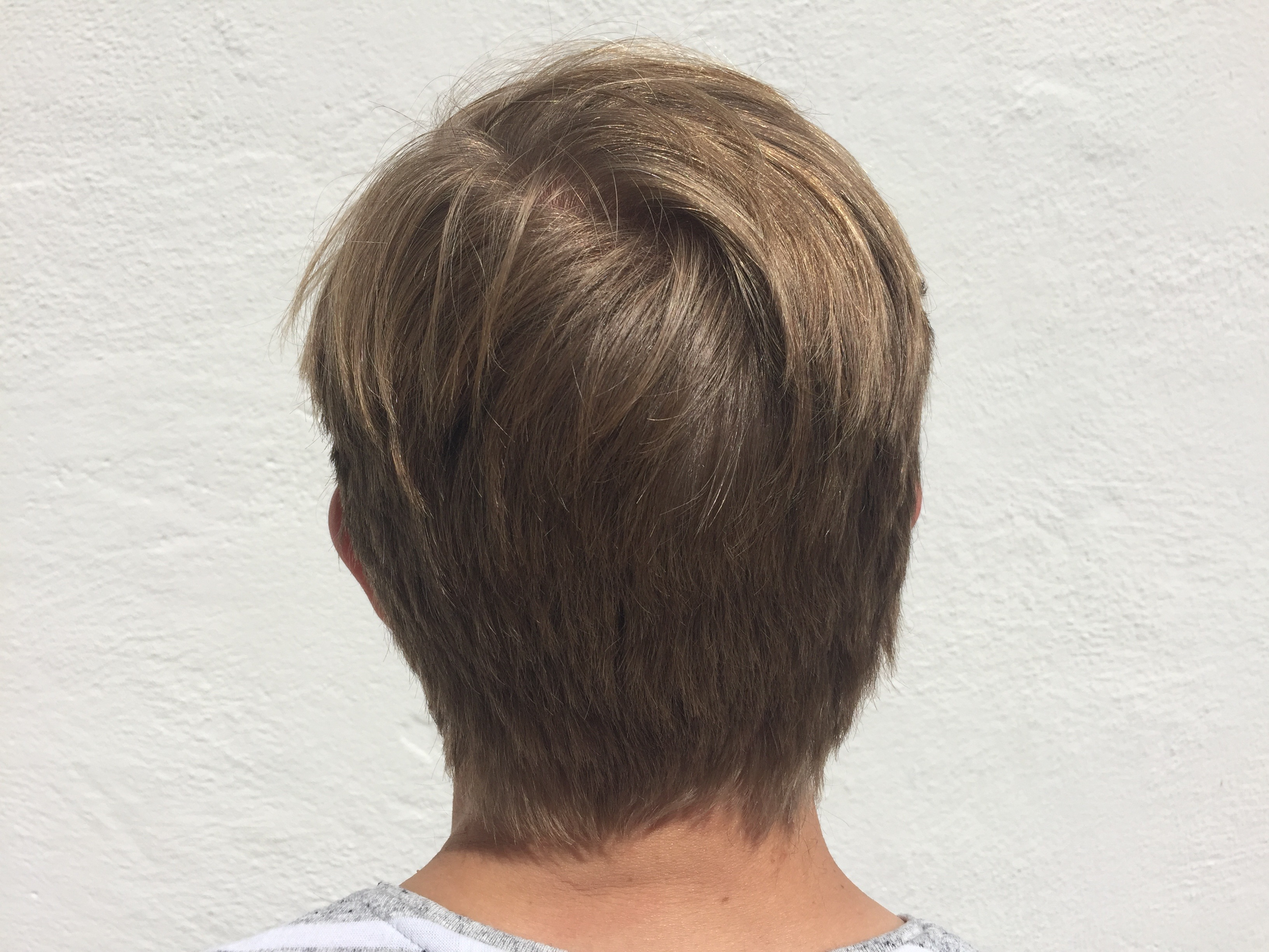 Peder Udnæs i Forfatterne bak